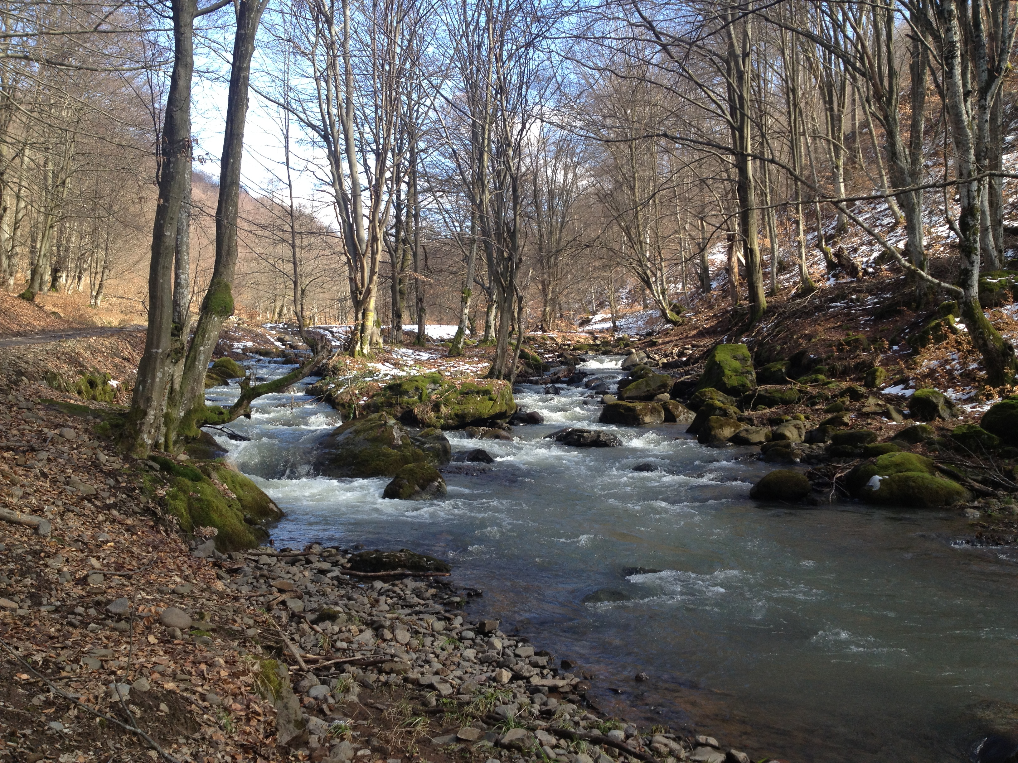 Râul Tur, primăvara 2013, după dezgheț. Locație, Negrești Oaș, Țara Oașului, România.